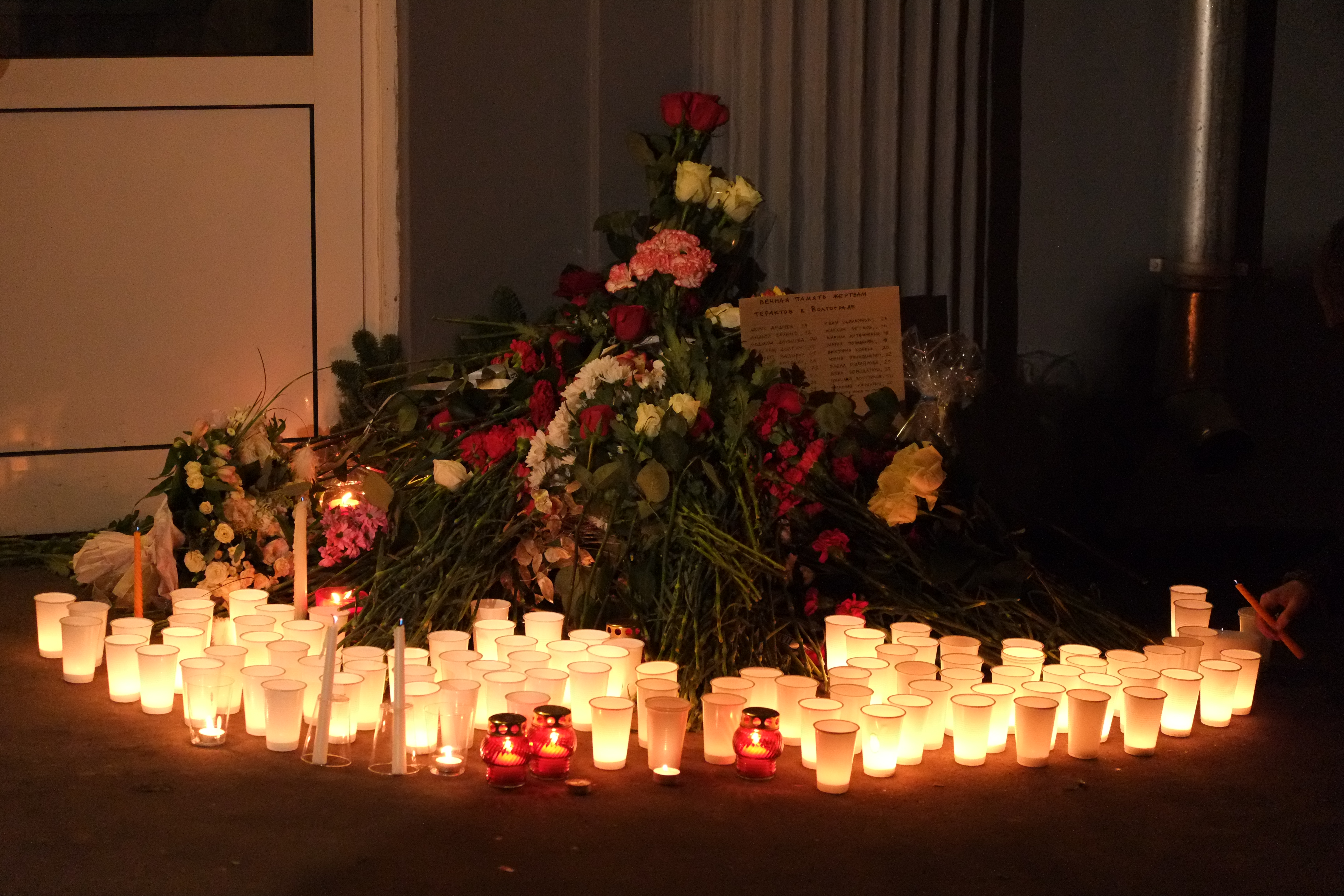 Акция солидарности с пострадавшими от террактов в Волгограде и их близкими. Москва, Мамонов переулок, 6